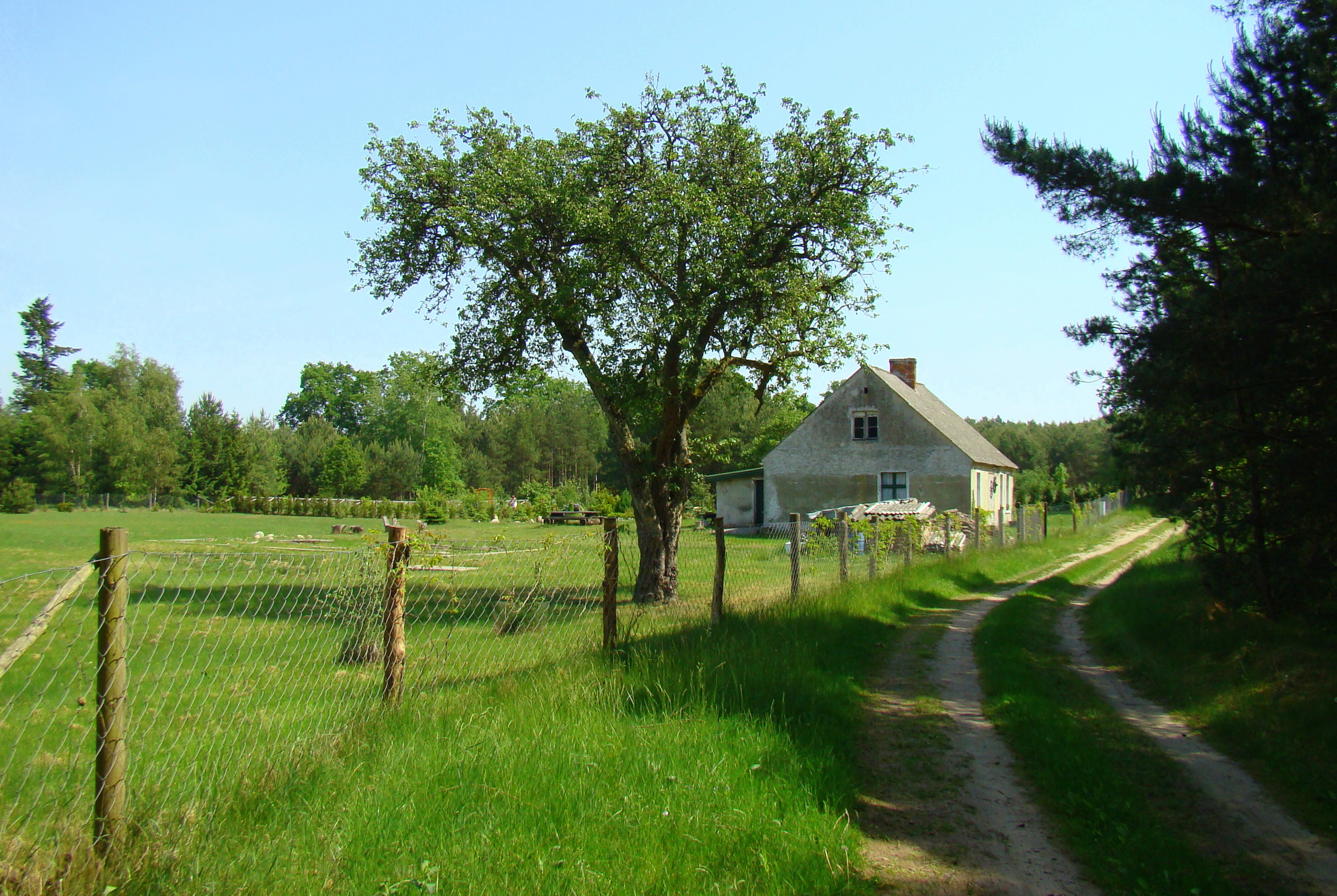 Myślibórz Mały, (Gmina Nowe Warpno, Województwo zachodniopomorskie), Polska